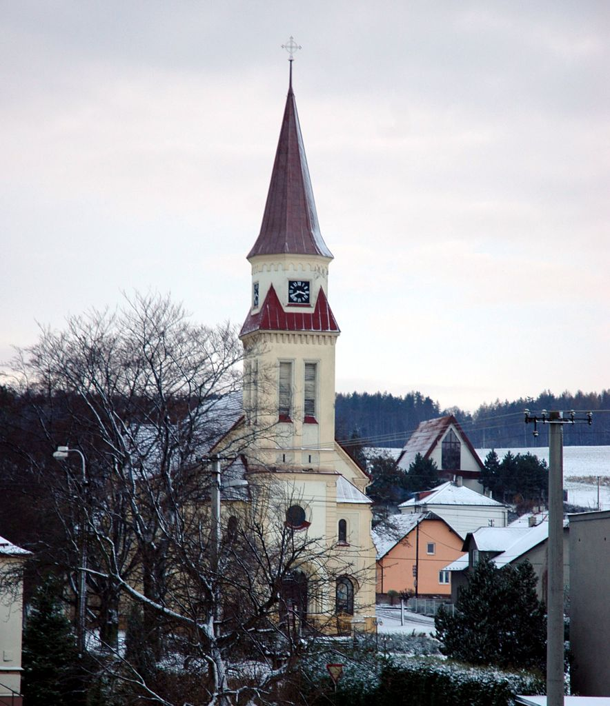 kostel sv. Valentina, Háj ve Slezsku